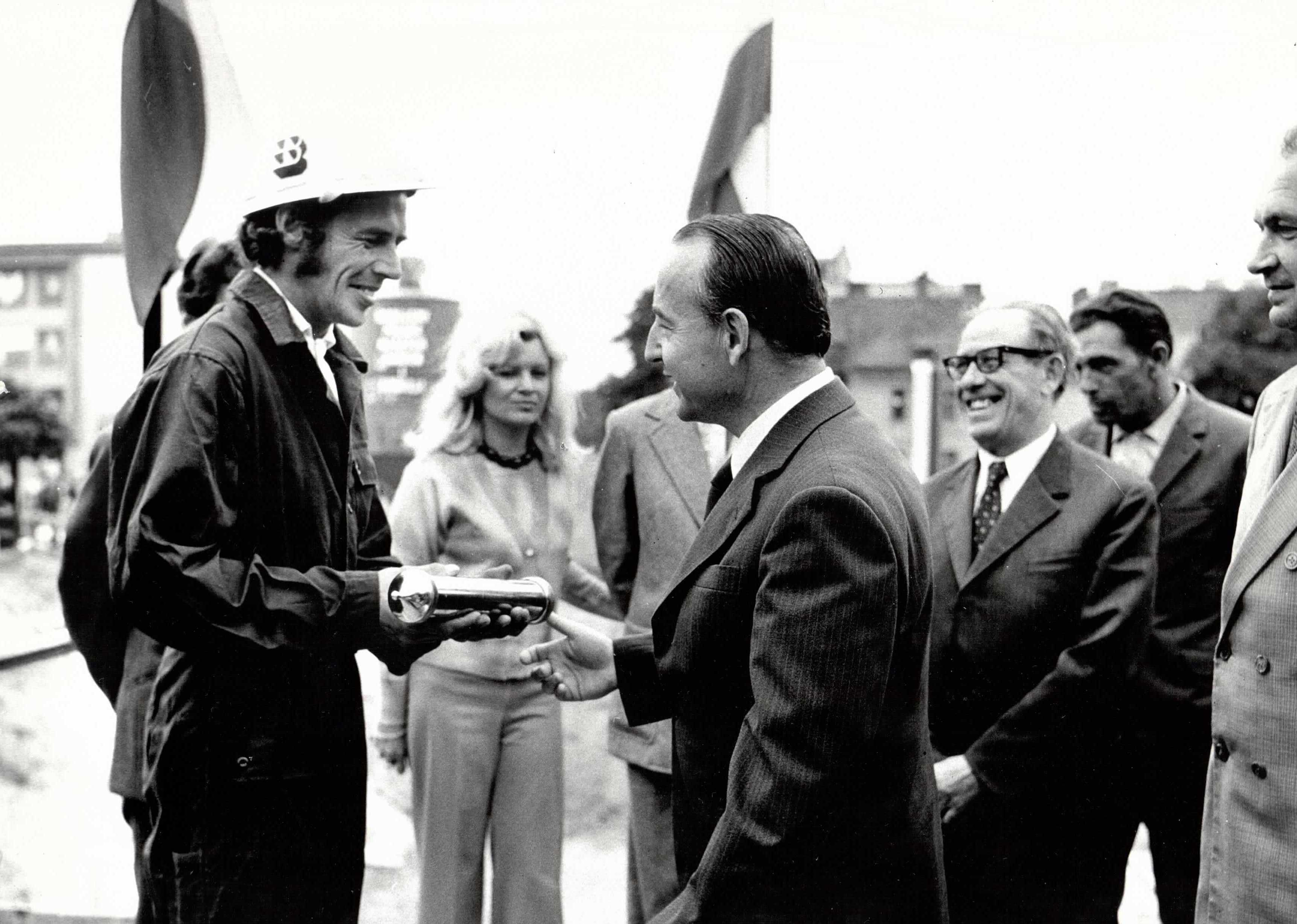 Wicepremier Jagielski przekazuje akt erekcyjny Teatru w Budowie 16.07.1974